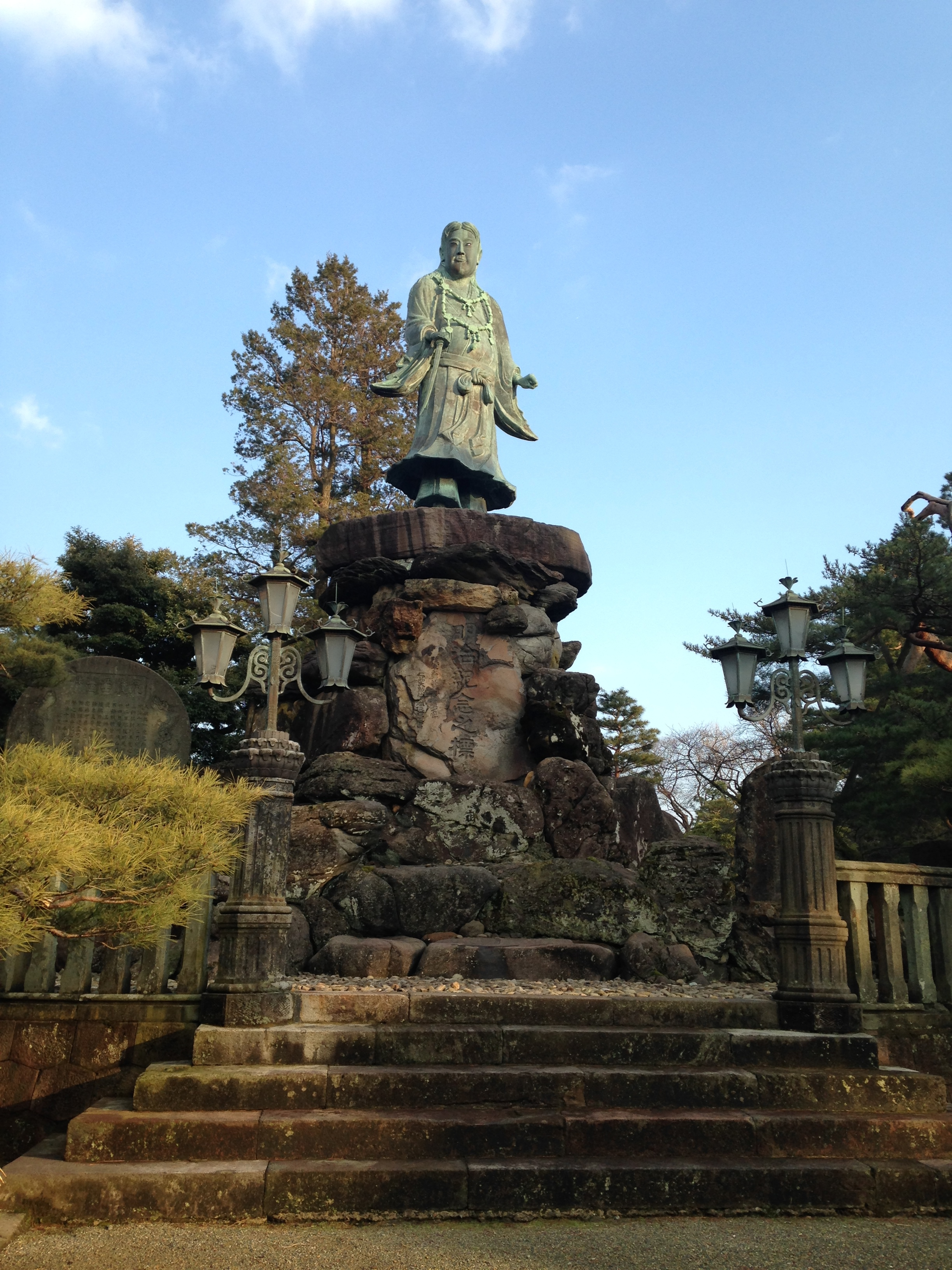 兼六園・明治記念之標